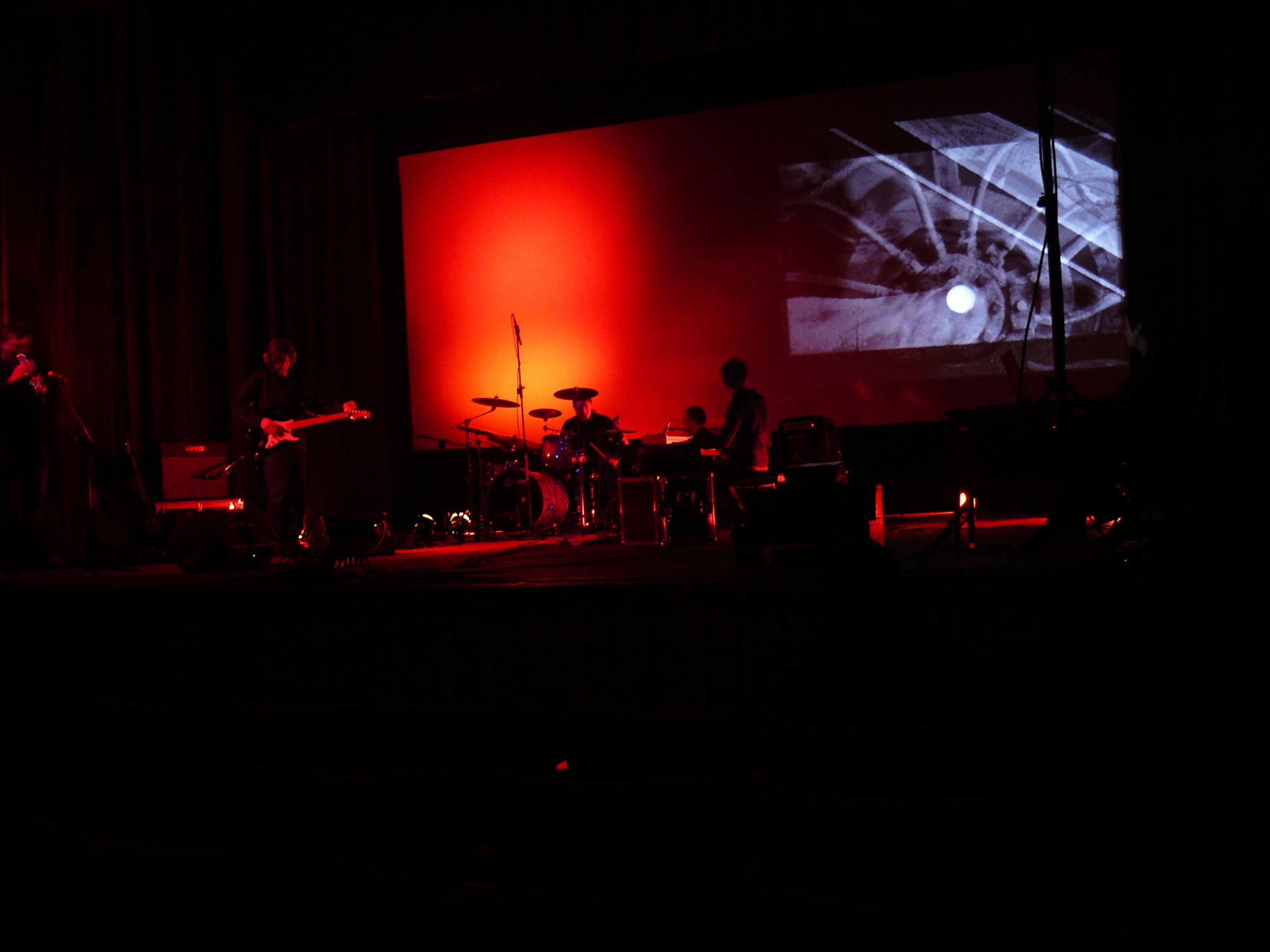 Light Coorporation (2008)